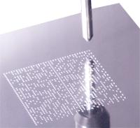 Datamatrix marcado por micropercusión. Foto cedida por el fabricante de máquinas marcadoras CYMAQ